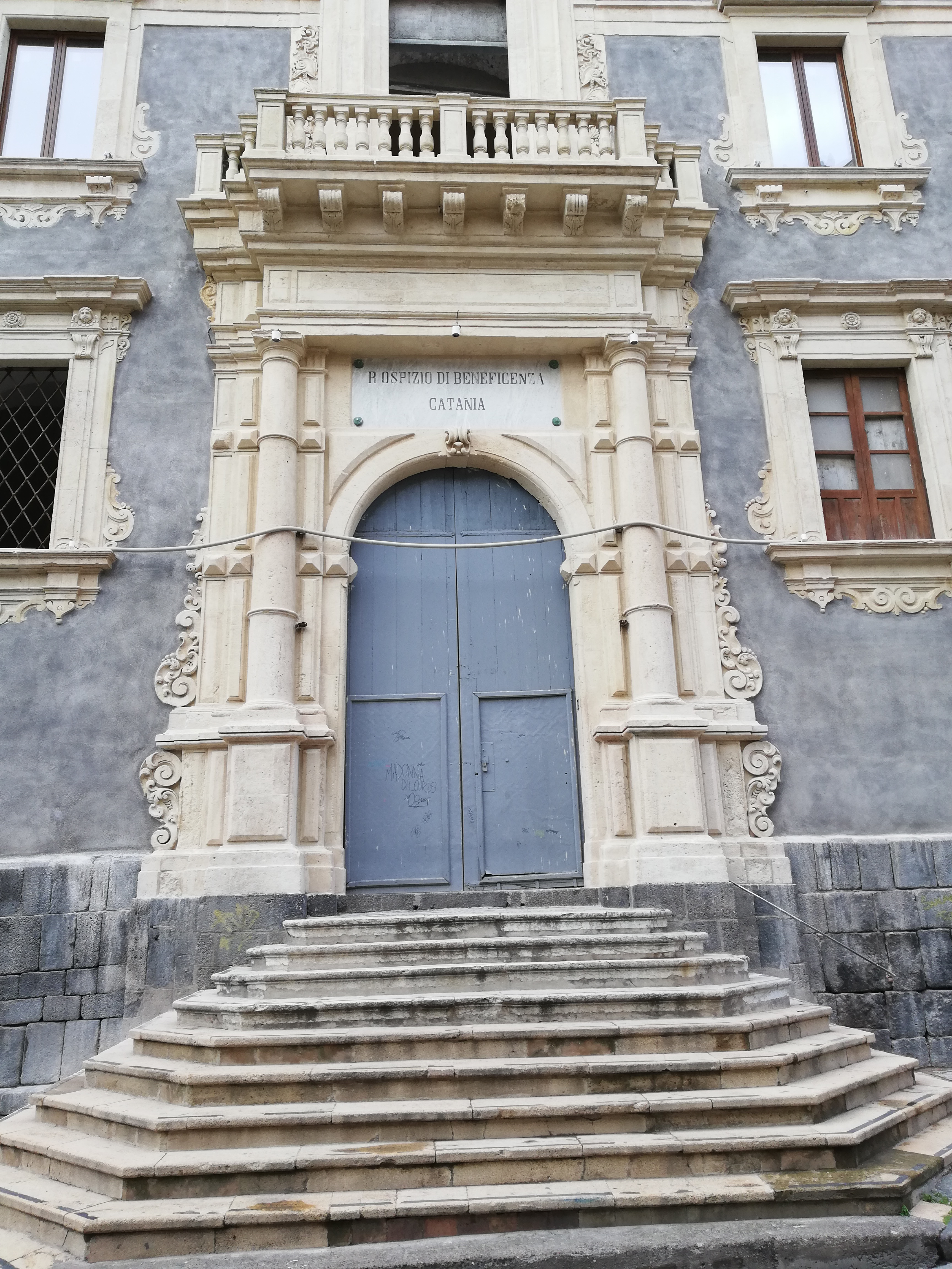 Ingresso Casa Professa.